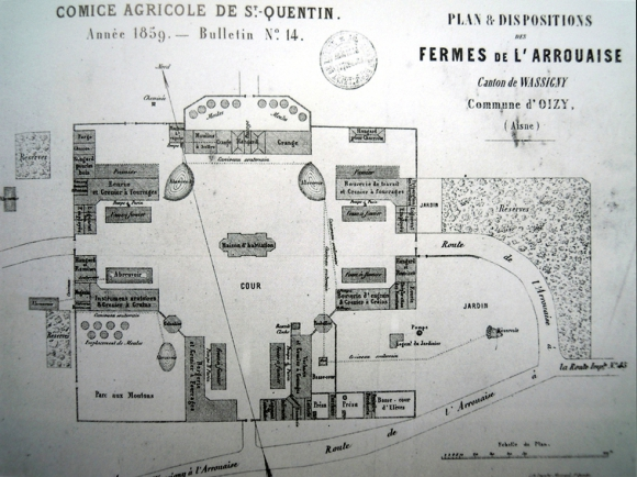 comice agricole de Saint-Quentin